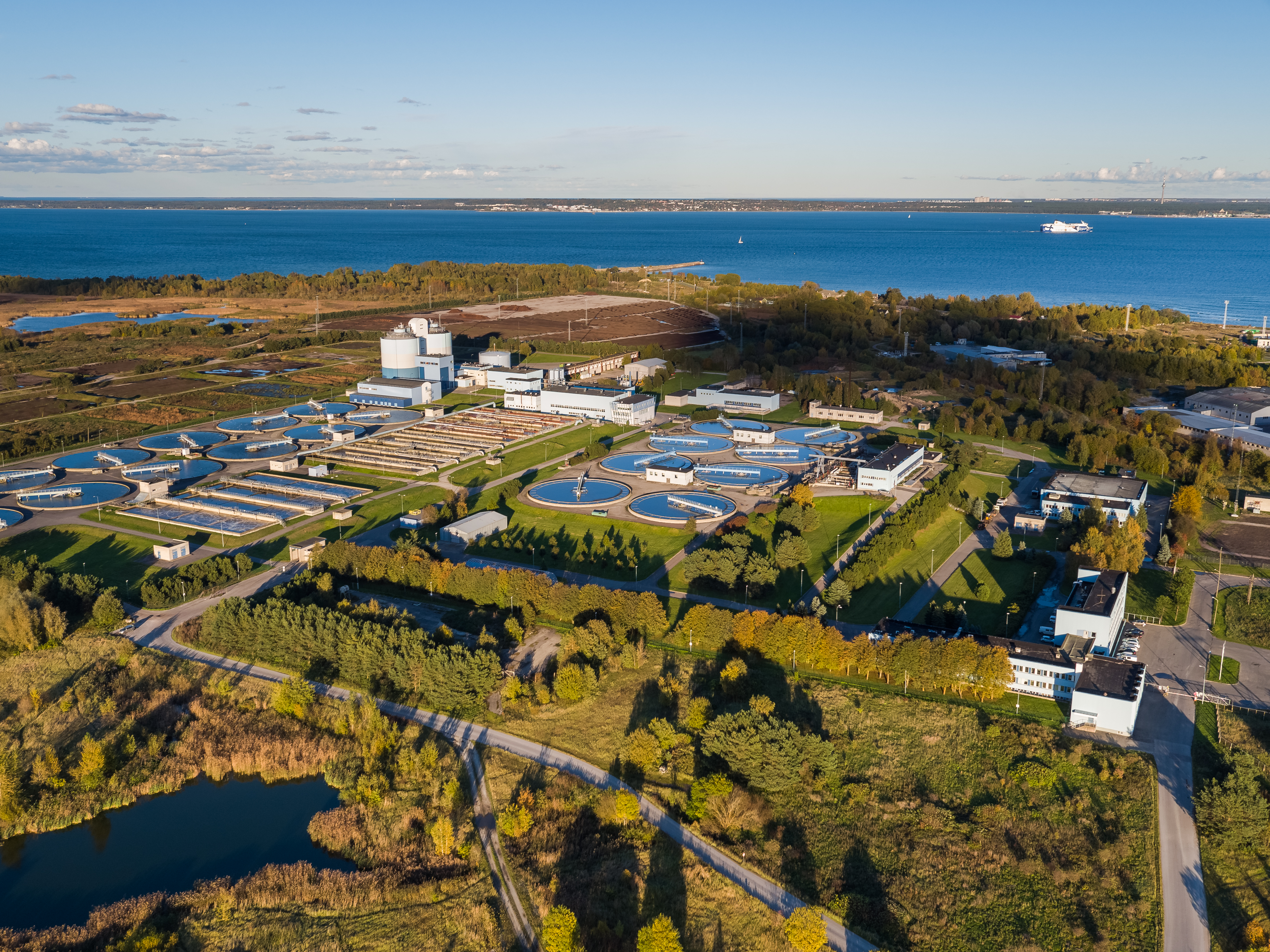 Paljassaare reoveepuhastusjaam Foto autor: Kaupo Kalda